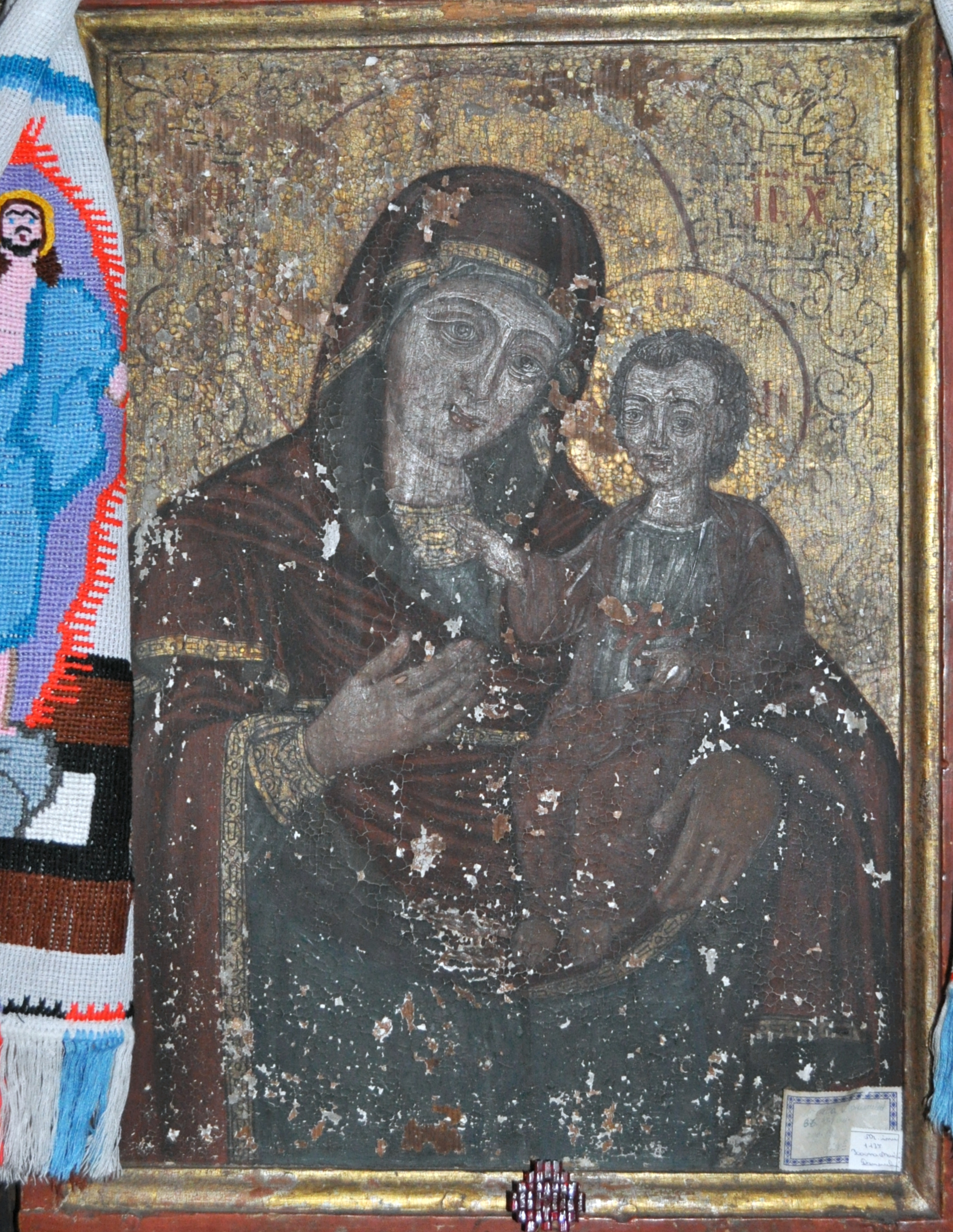 Biserica de lemn „Pogorârea Sf. Duh" din Sartăș, județul Alba